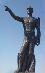 Se corrige inclinación y se eliminan detalles periféricos para centrarse en la estatua.